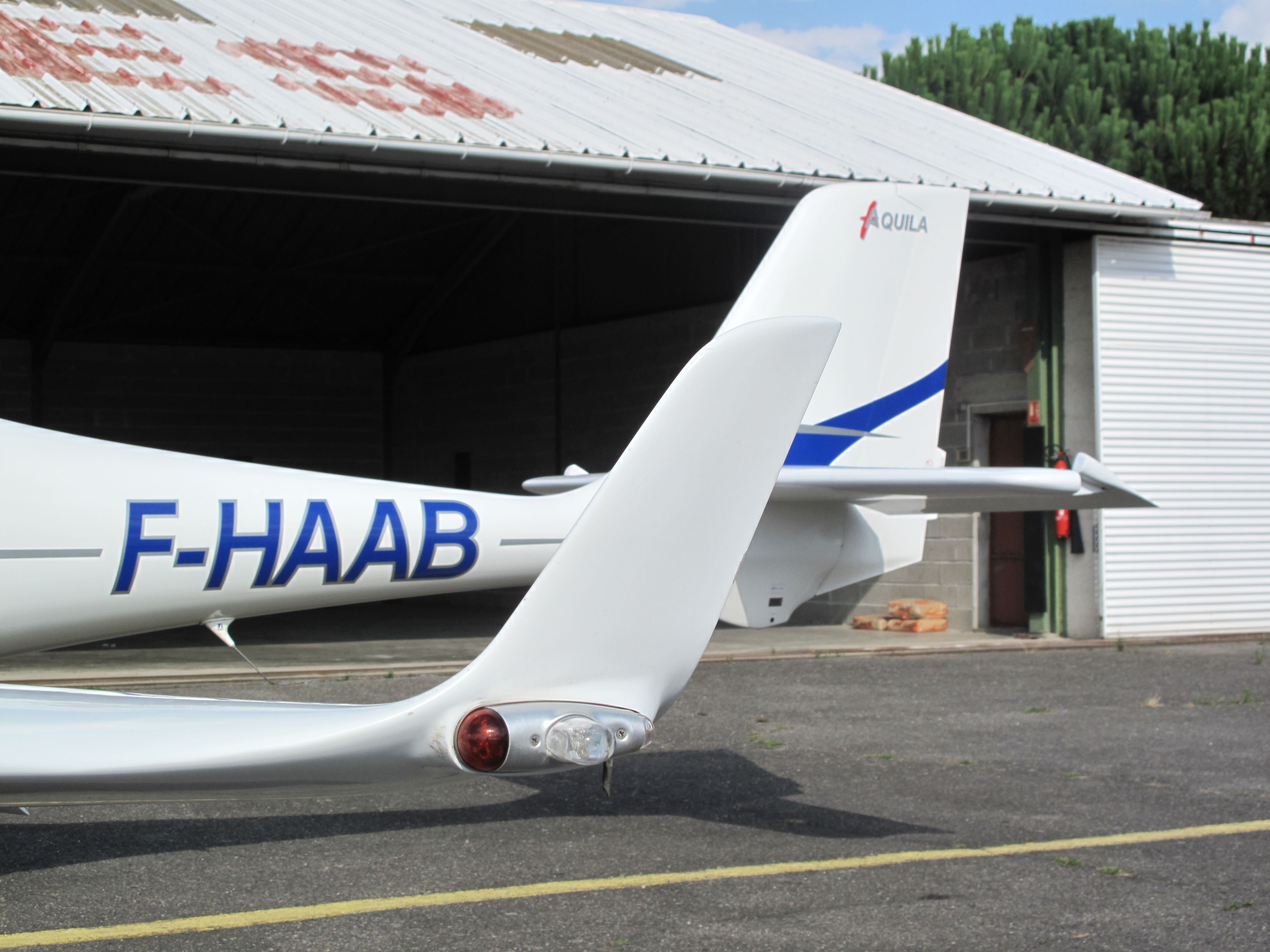 Saumon Winglet d'un Aquila (AT01) F-HAAB de l'ACTMP @ Lasbordes (LFCL)